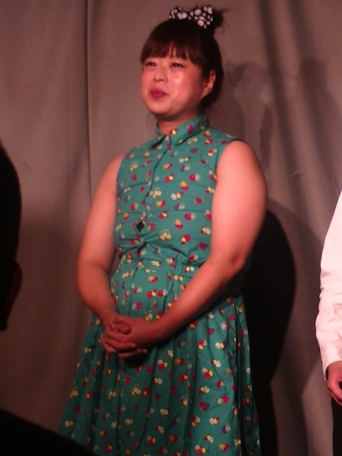 まぁこ (2018年9月)